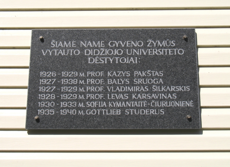 Atminimo lenta, Kaunas.